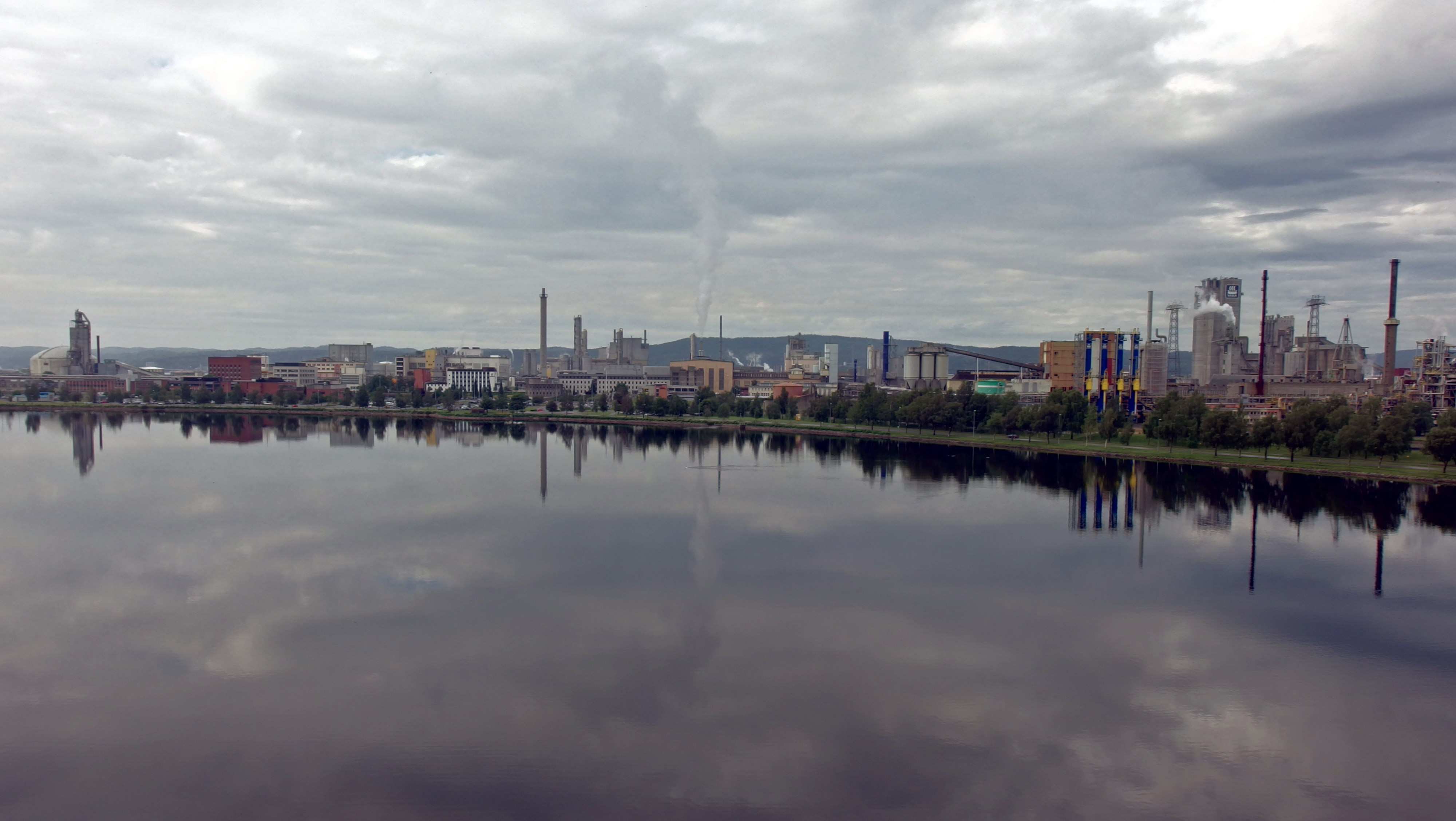 Herøya Industripark i Porsgrunn.